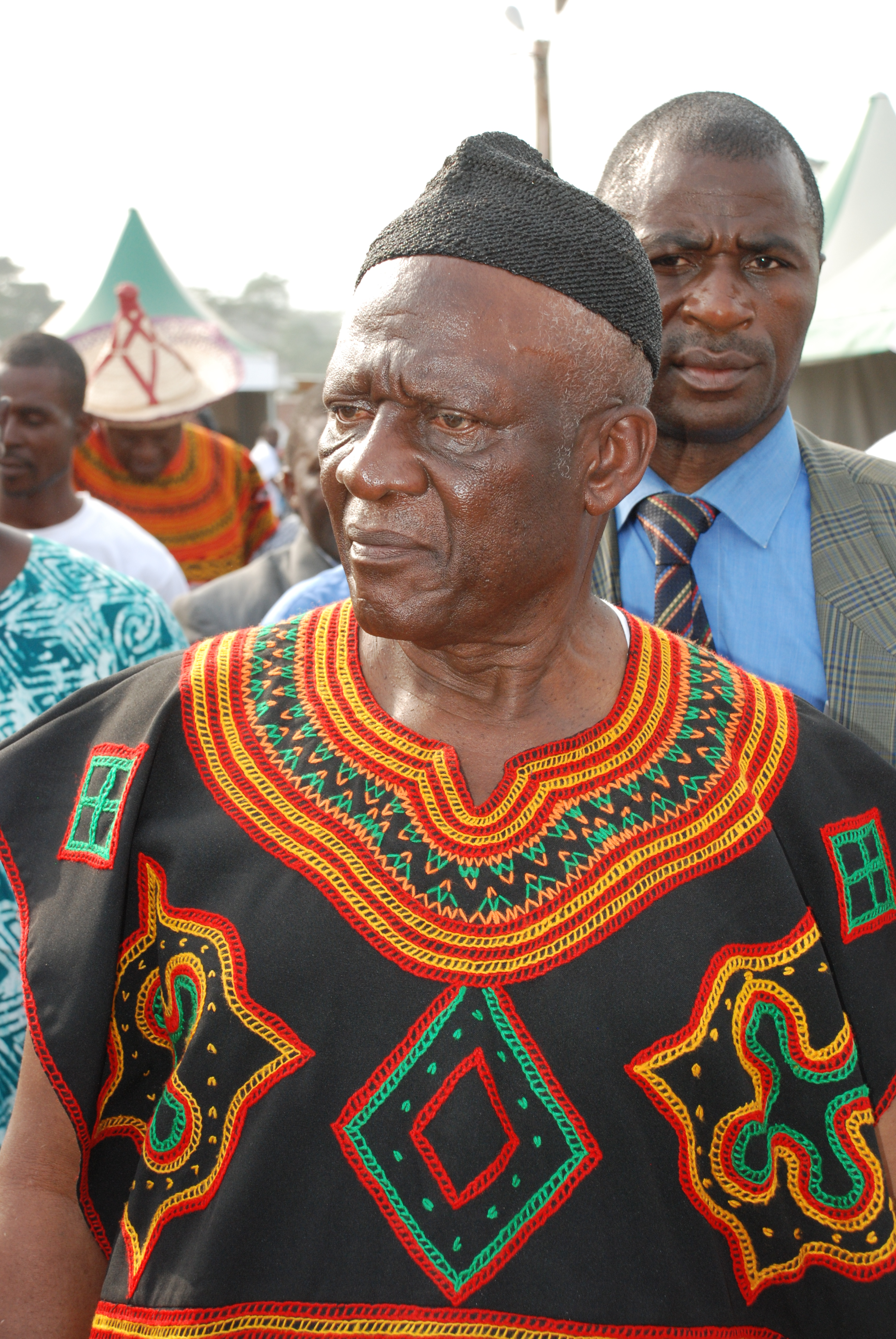 Ni John Fru Ndi, président du SDF This is an image of Cultural Fashion or Adornment from Cameroon